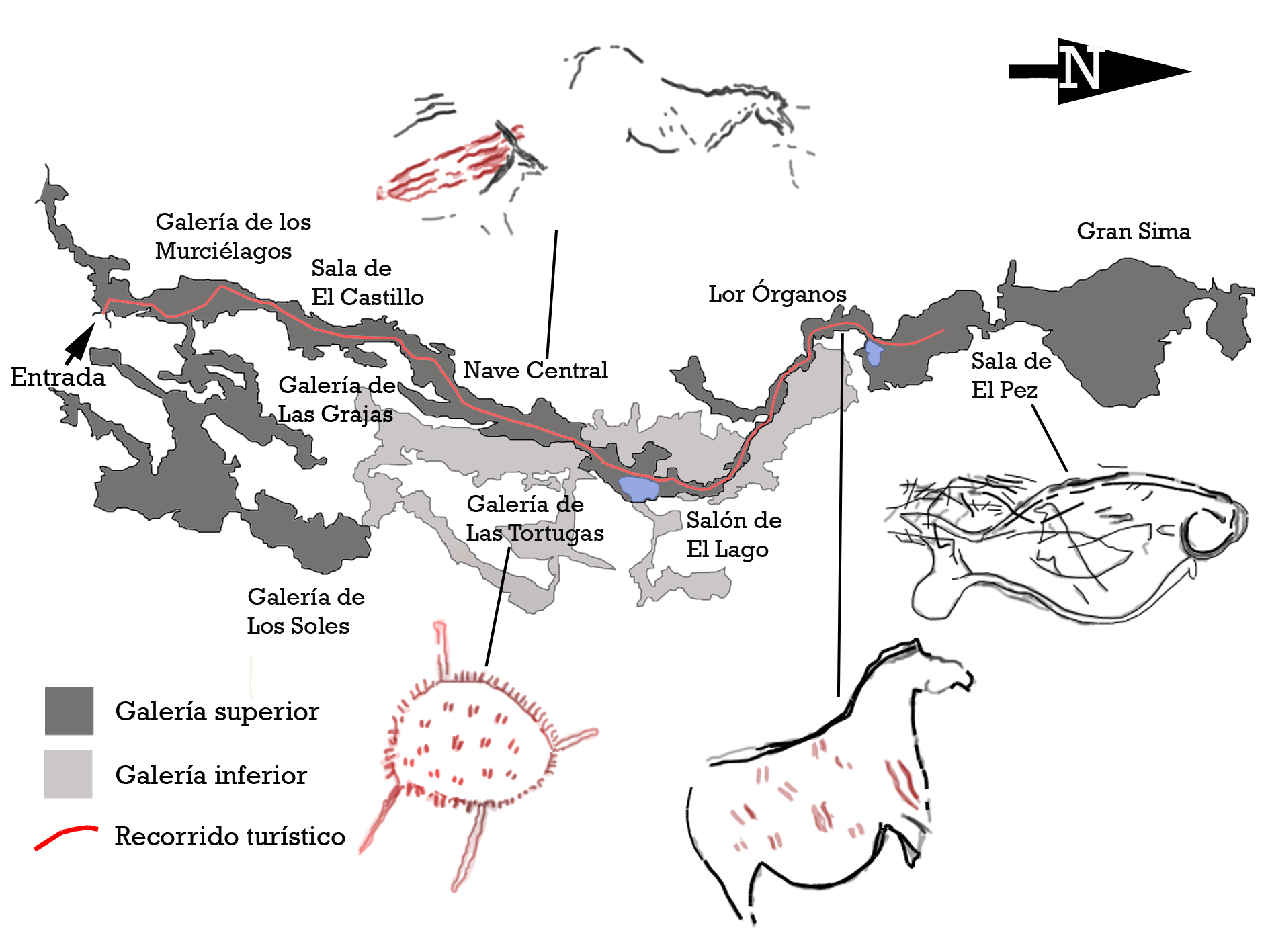 Plano de la cueva de la pileta, Benaoján, provincia de Málaga, Andalucía